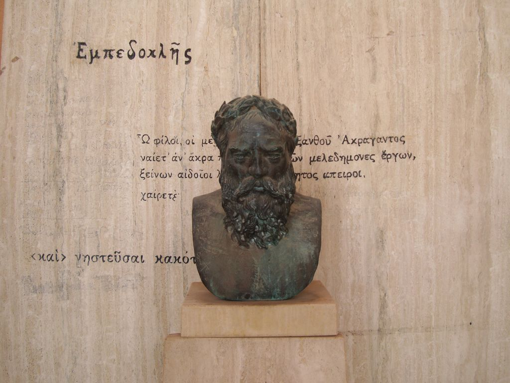 Il busto del filosofo agrigentino Empedocle posto nell'atrio del Liceo Classico Empedocle di Agrigento